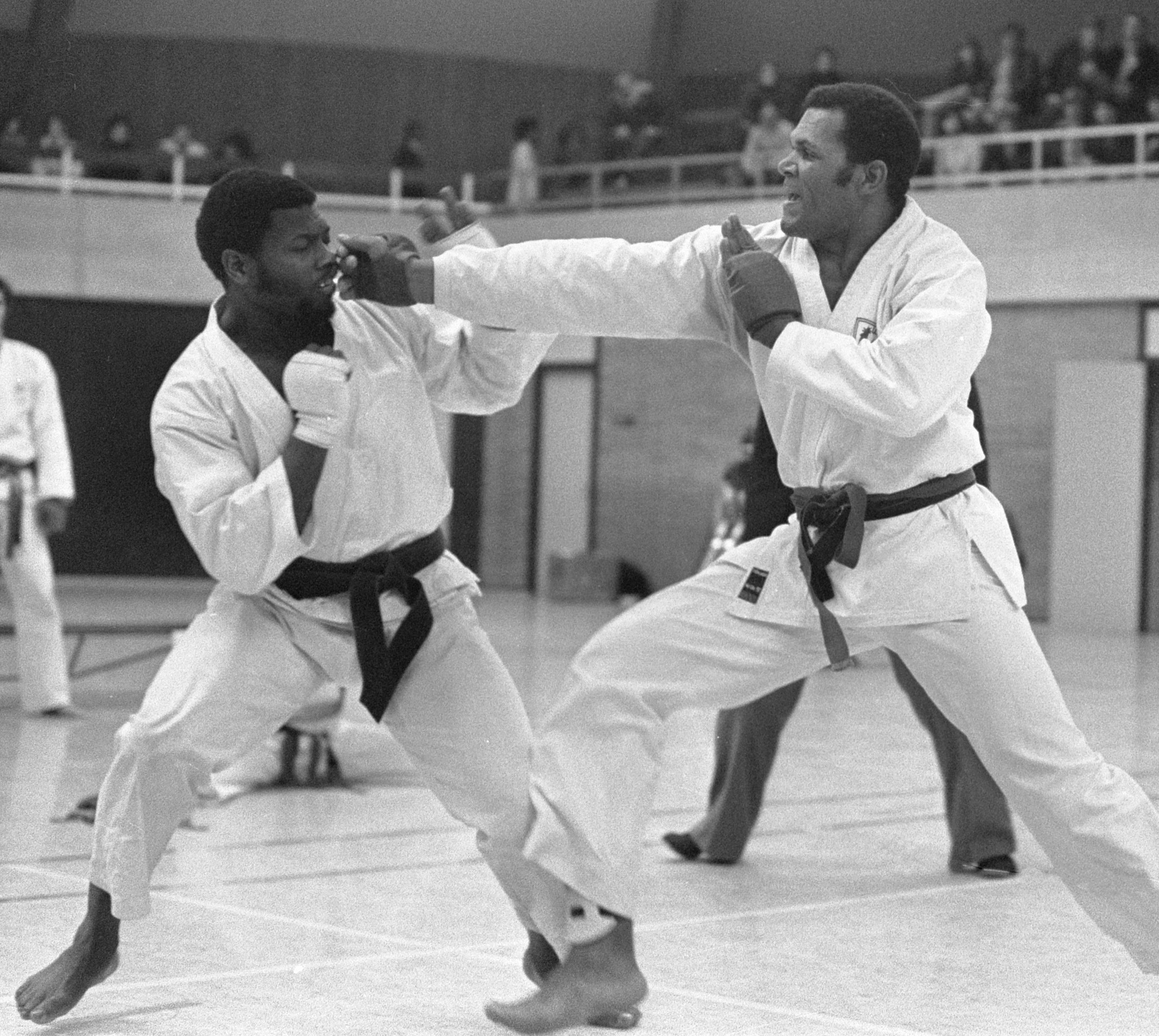 Karate interland Nederland tegen Frankrijk; Nederlander Kotzebue (l) tegen Fransman Candal.